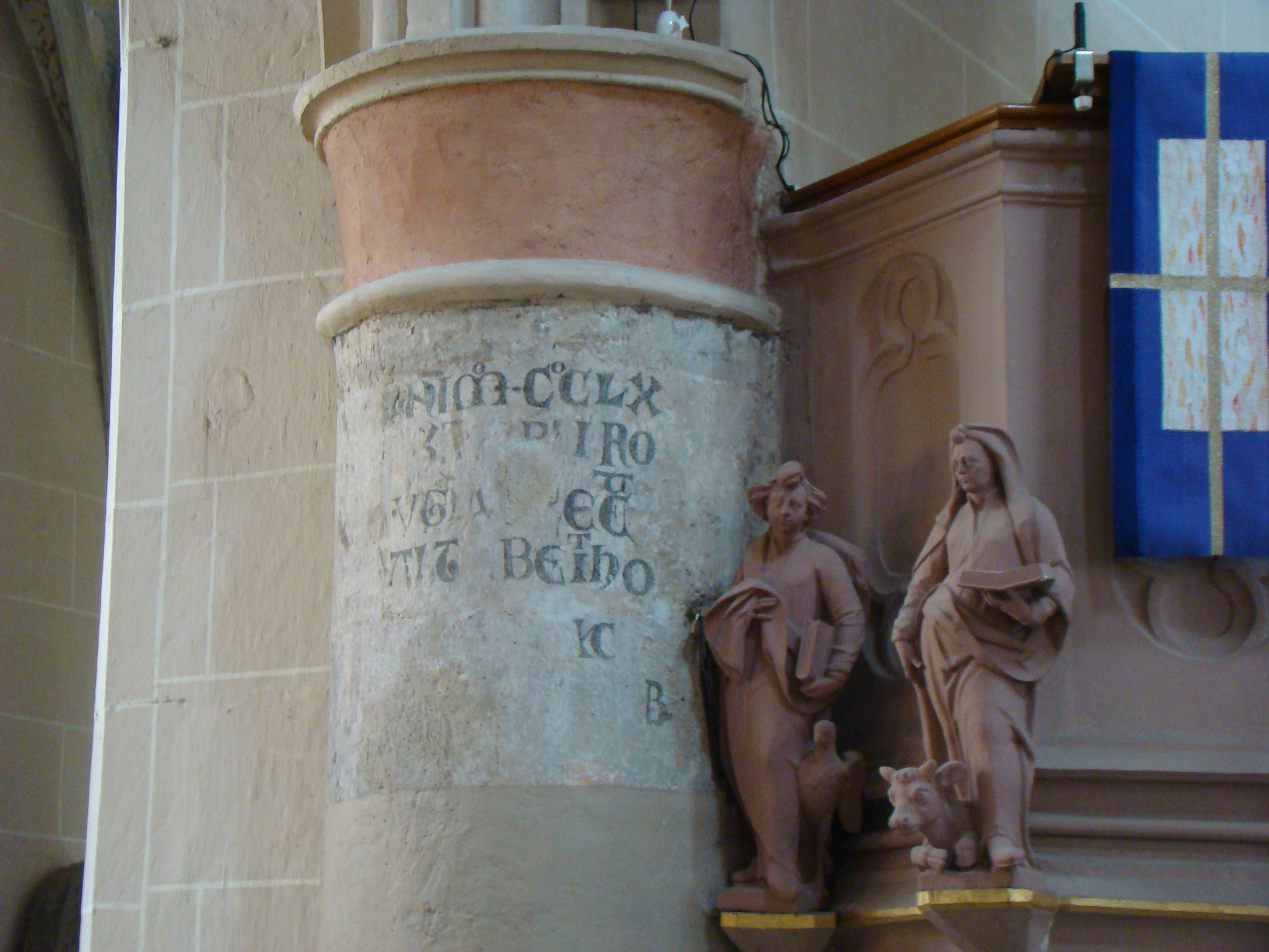 Bartholomäuskirche in Markgröningen; 1955 wiederentdecktes Fragment der Weihinschrift (MCCLX=1260) bei der Kanzel